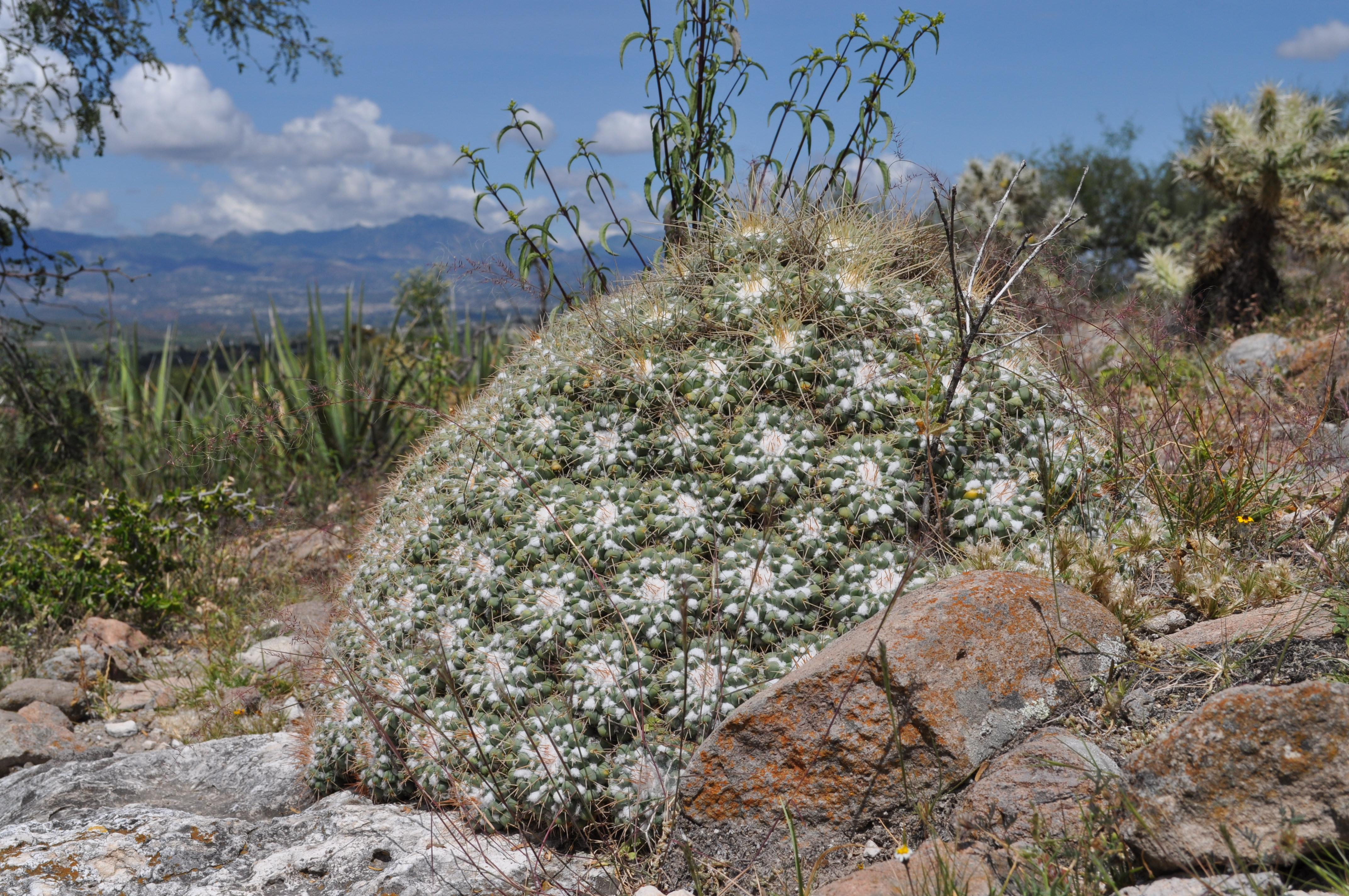 Ixmiquilpan, Hgo., Mexico